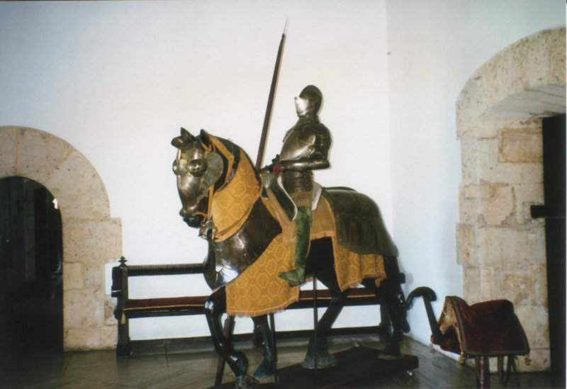 Author Giorces.Cavaliere e cavallo armati.